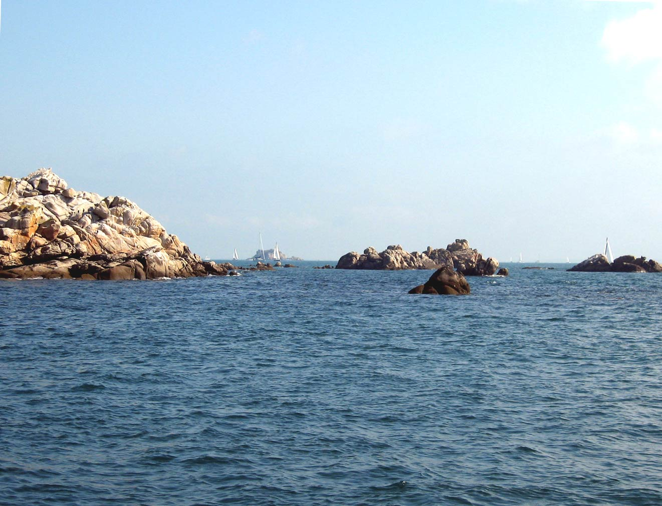 Description : Passage des Soeurs entre les iles de Houat et de Hoedic Place : Ile de Houat, Bretagne, France Date : 2006 Auteur : Pline